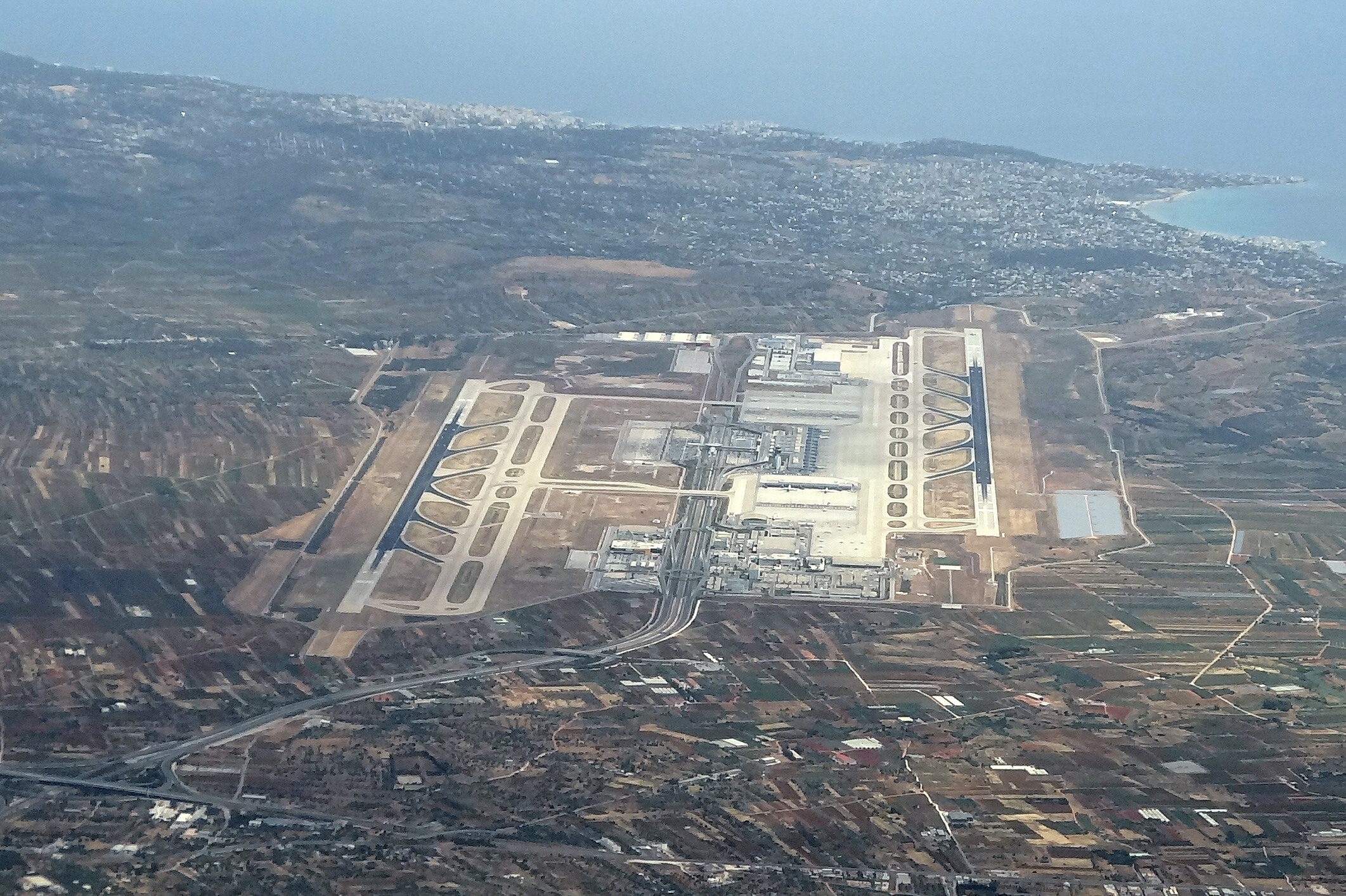 ATH AIRPORT 737 LN-RGA FLIGHT ATH-ARN